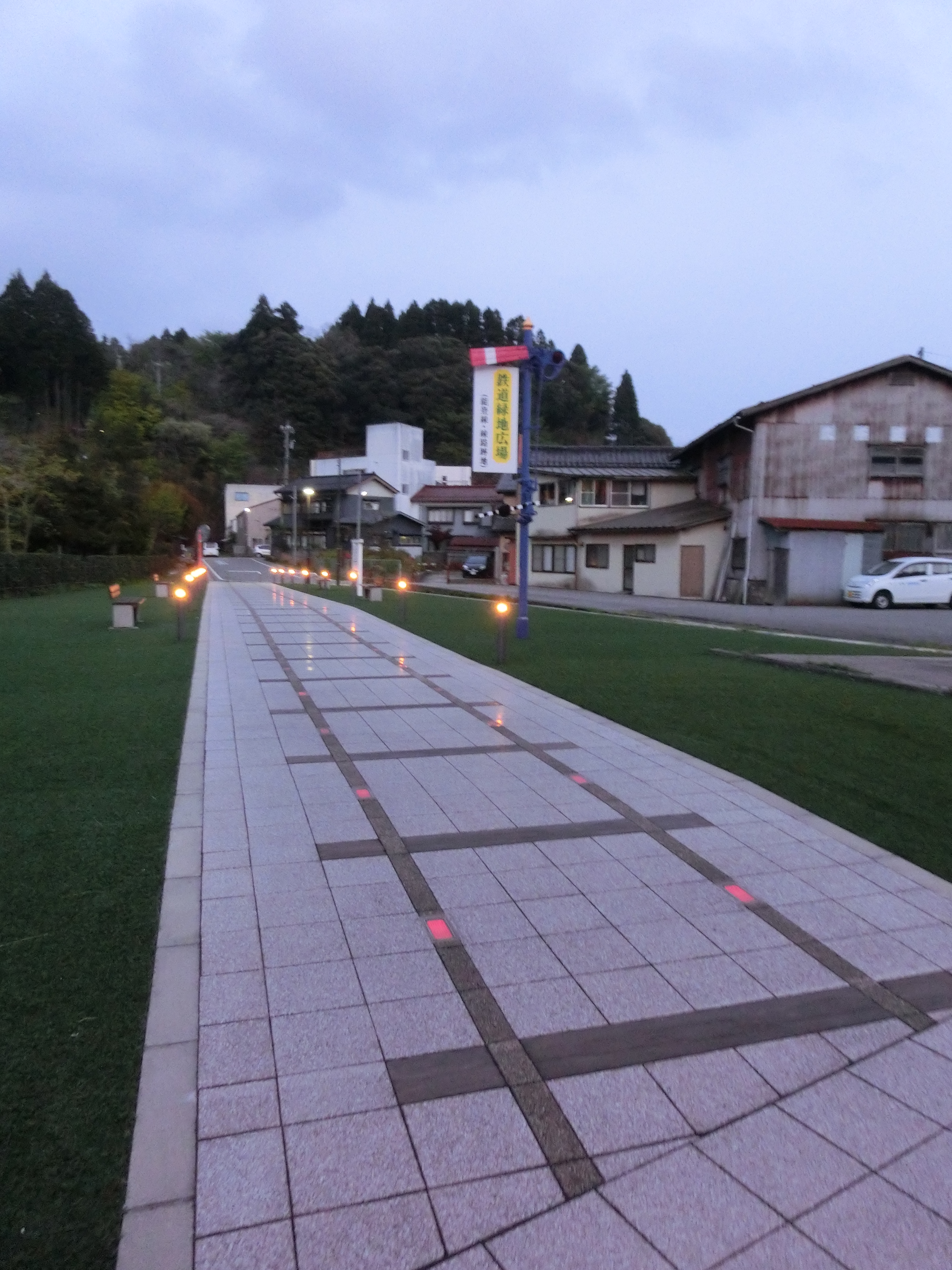 宇出津駅跡鉄道広場(2017年4月撮影)